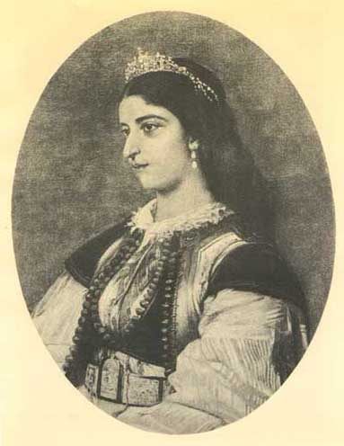 Даринка Петрович-Негош, жена Данилы